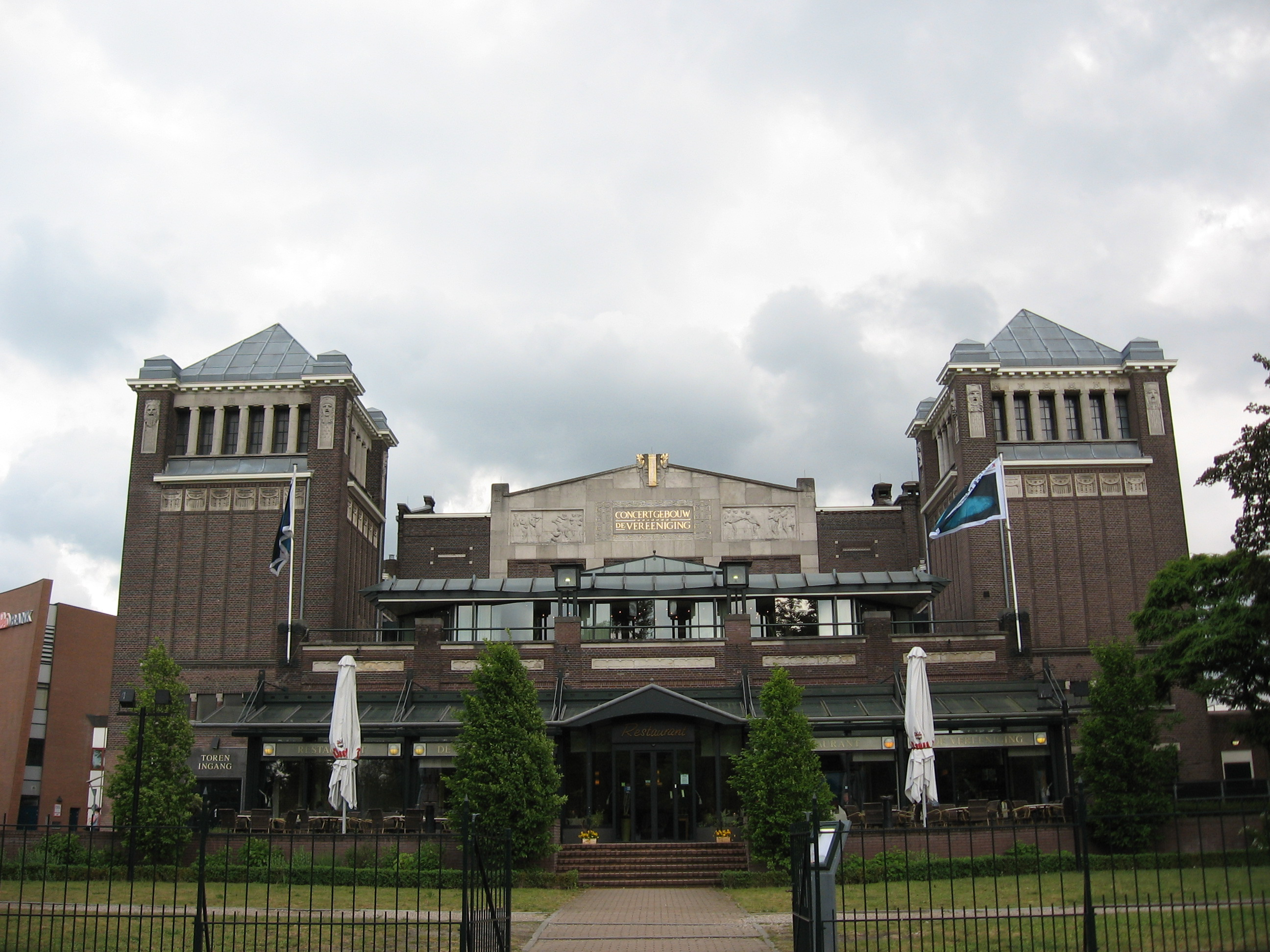 Concertgebouw 'De Vereeniging' te Nijmegen (in 2007)